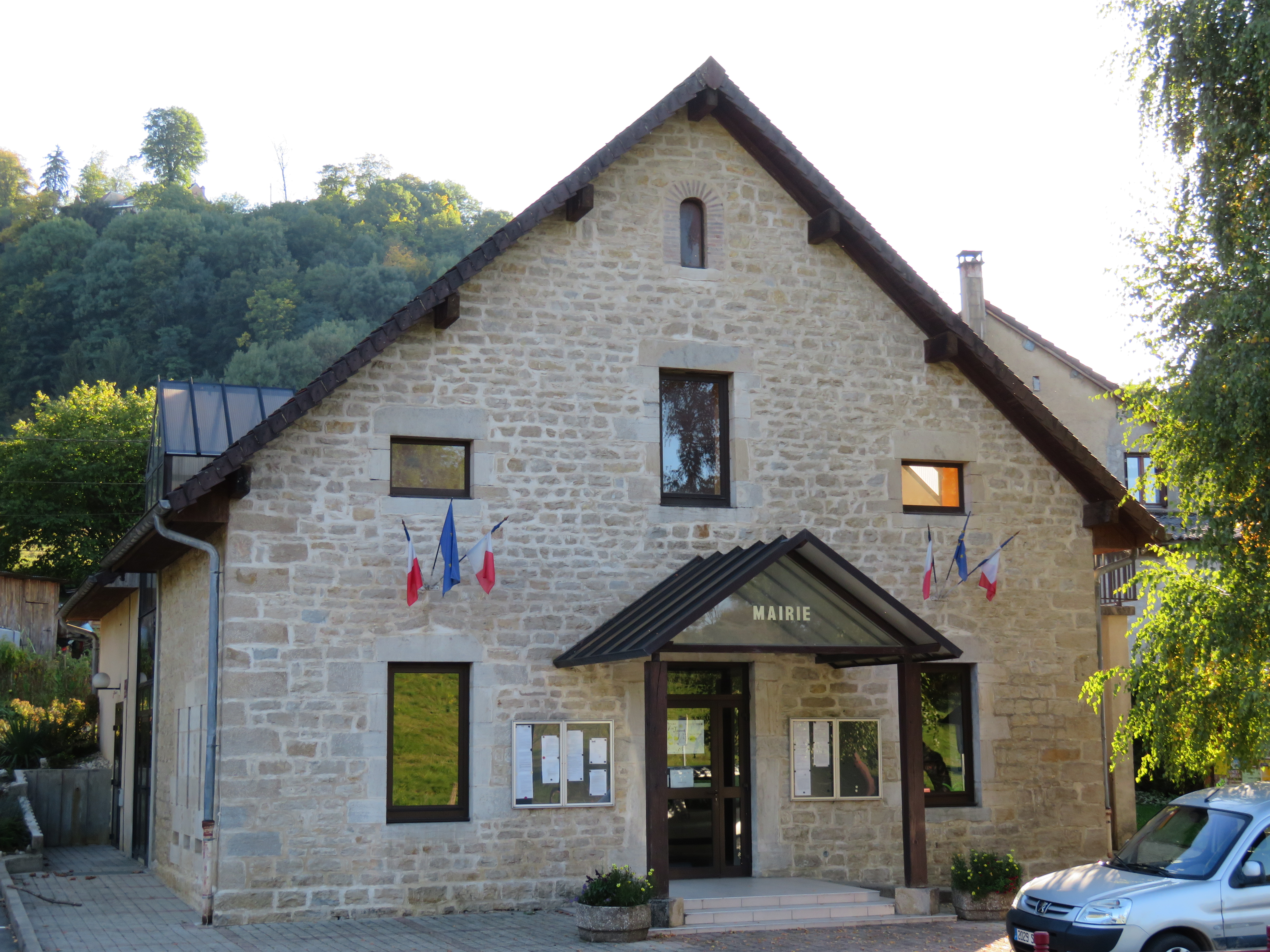 Mairie de l’Étoile (Jura).